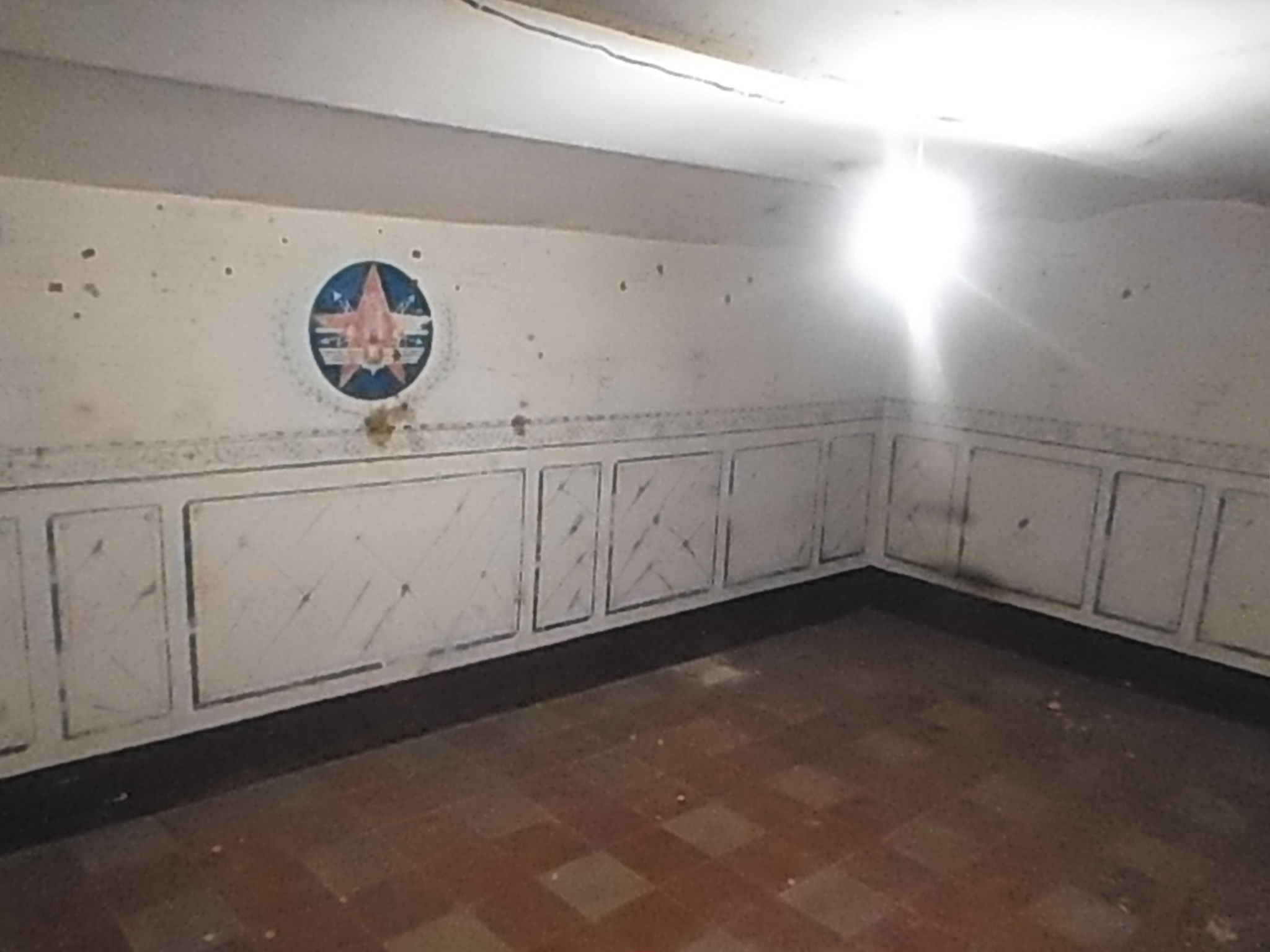 Sirvió de escondite republicano donde se refugiaban los pertenecientes al hospital (hoy Palacio de los Condes de Ayala) en Castuera, durante la Guerra Civil.